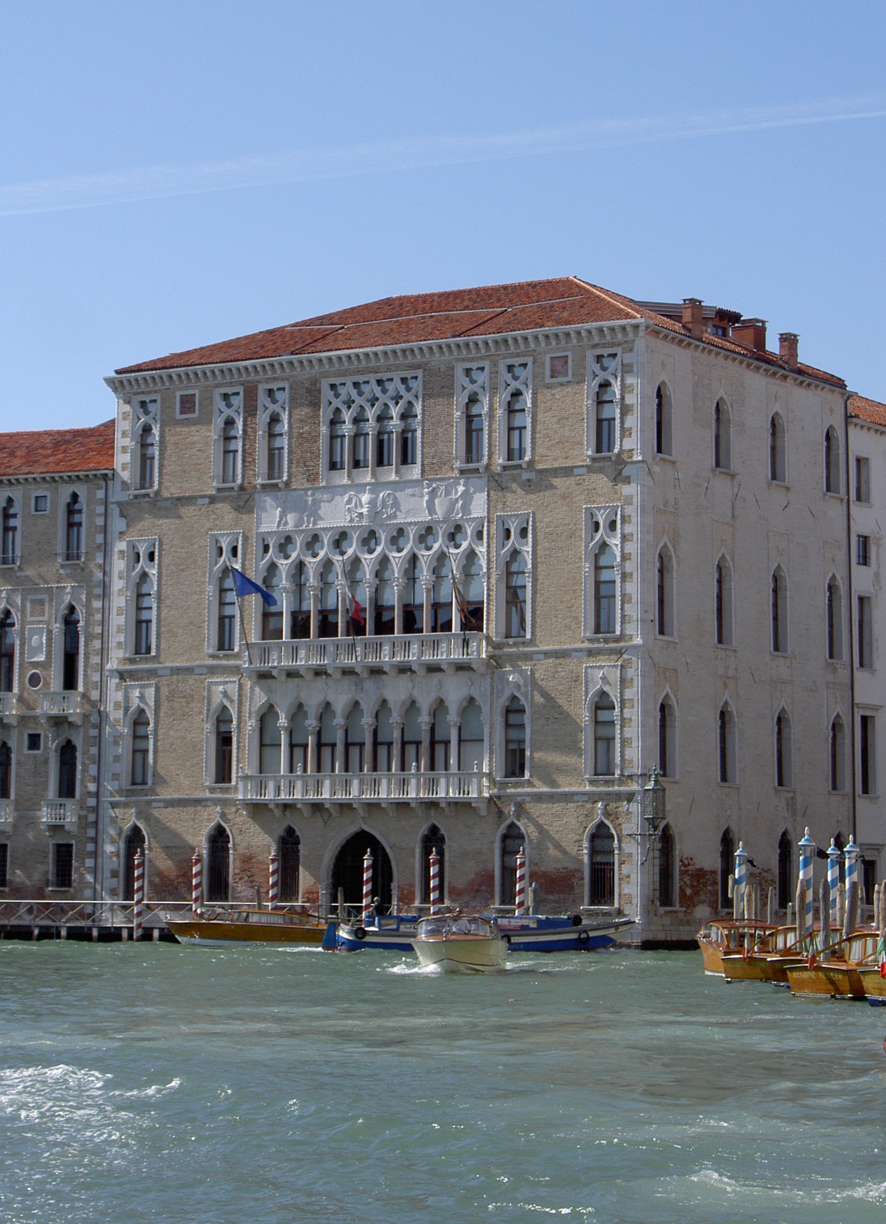 Der venezianische Palast Ca' Foscari